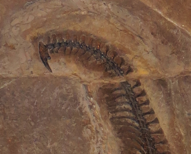 Fossil of Drepanosaurus, an extinct reptile- Took the picture at Museo di Scienze Naturali, Bergamo